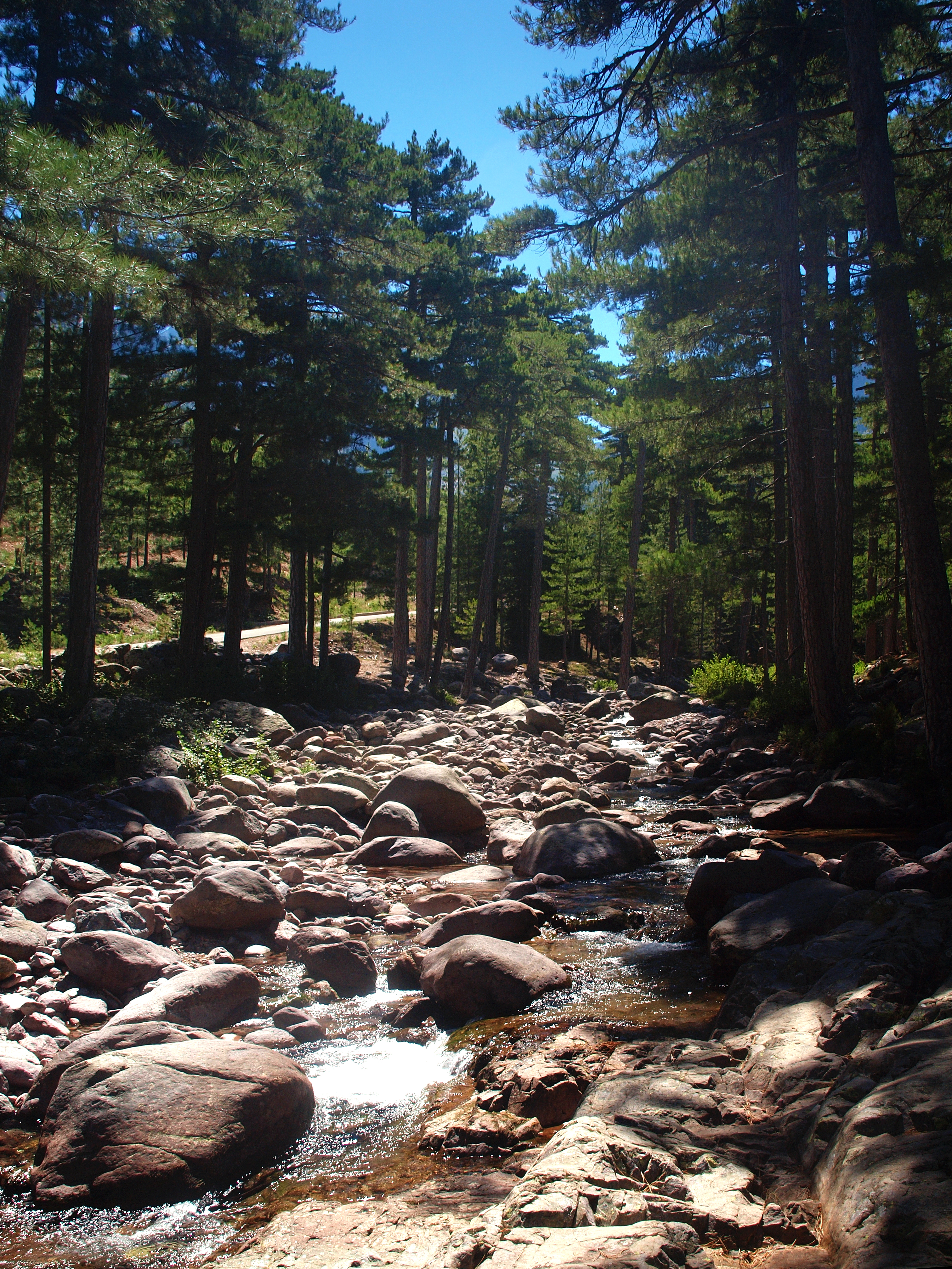 Asco (Corsica) - Ruisseau de Stranciacone dans la forêt de Carrozzica